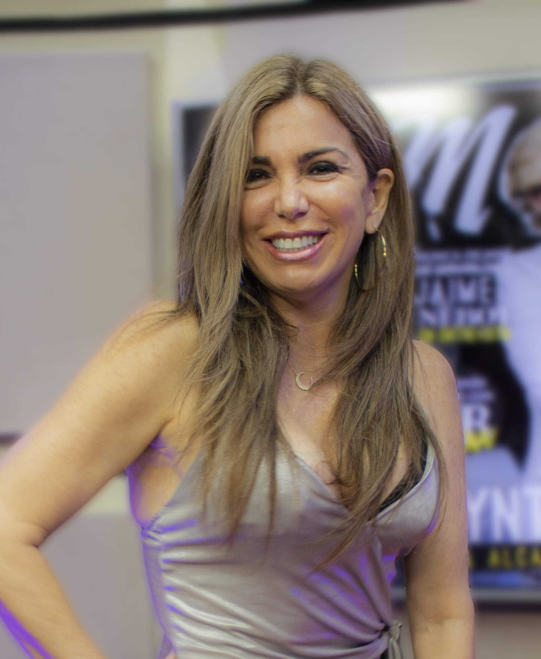 Mariela Viteri en Radio Fuego, en 2019.